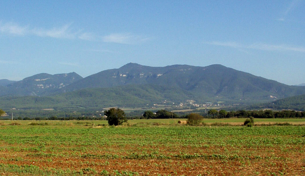 Mare de Déu del Mont vist des del Pla de Martís (Pla de l'Estany)